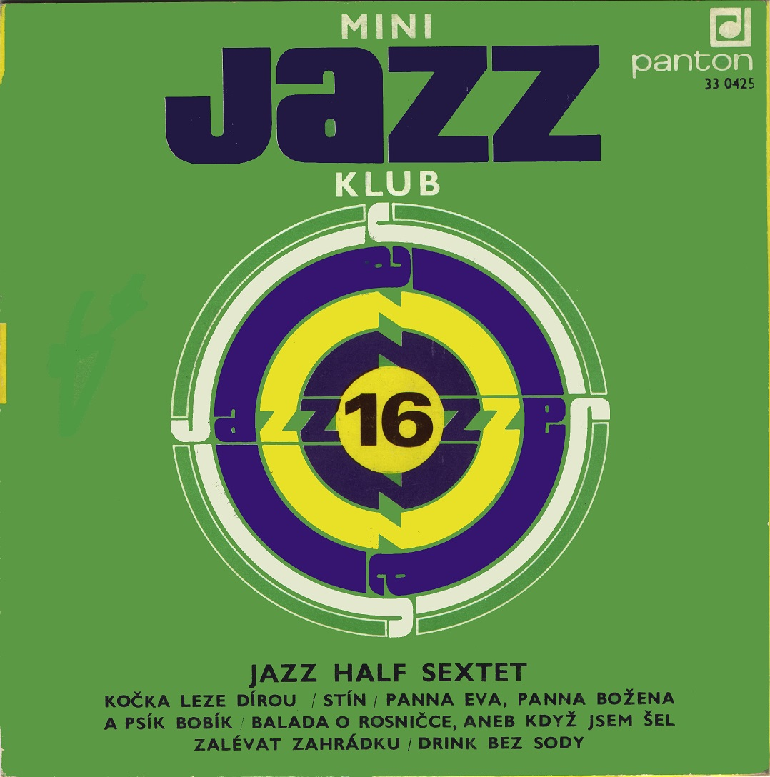 obal desky